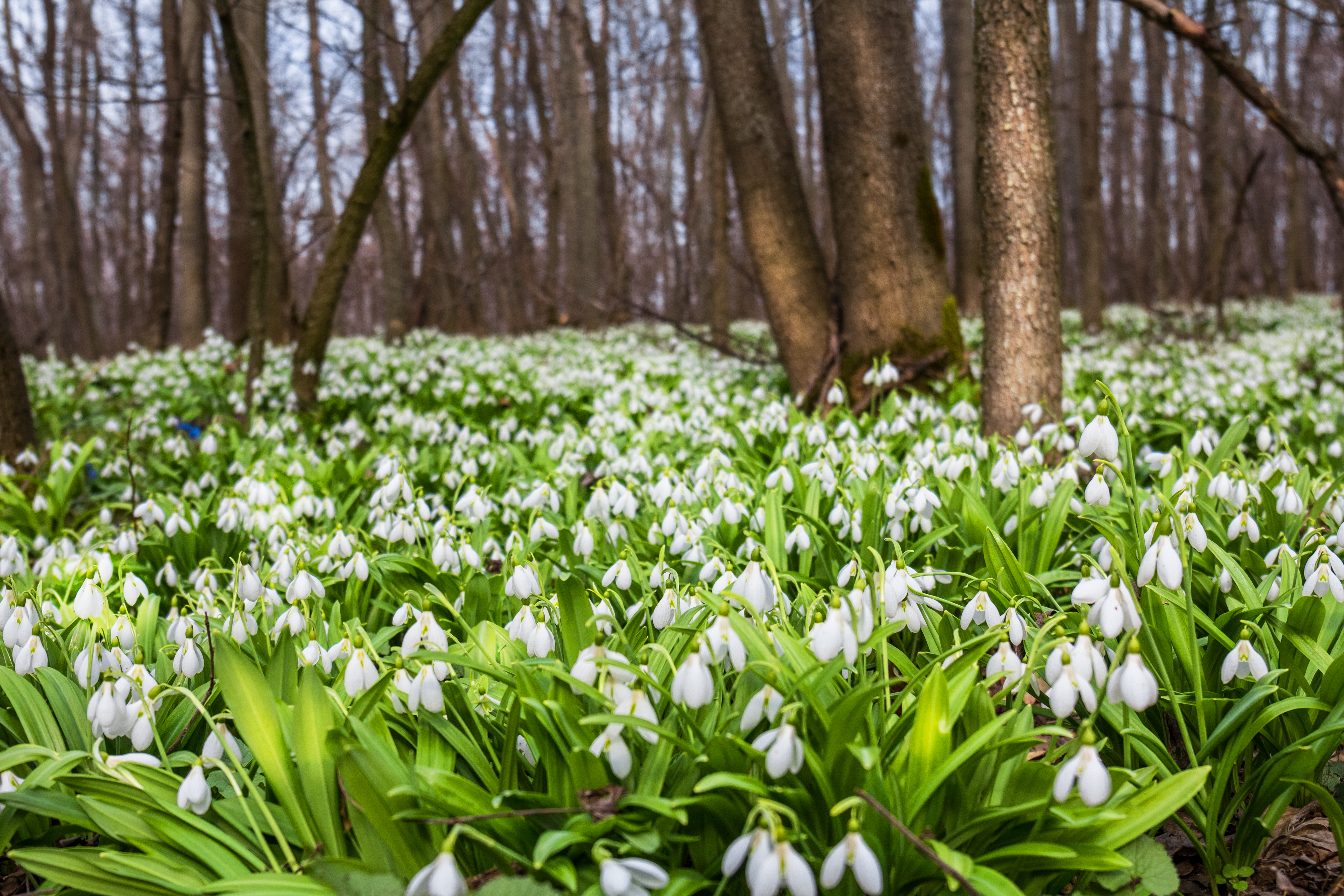 «Холодний яр», Чигиринський район, кв.кв. 31, 32, 33, 34, 35, 36, 37, 41, 42, 48, 49, 54, 55, 57, 58, 59 Креселецького л-ва